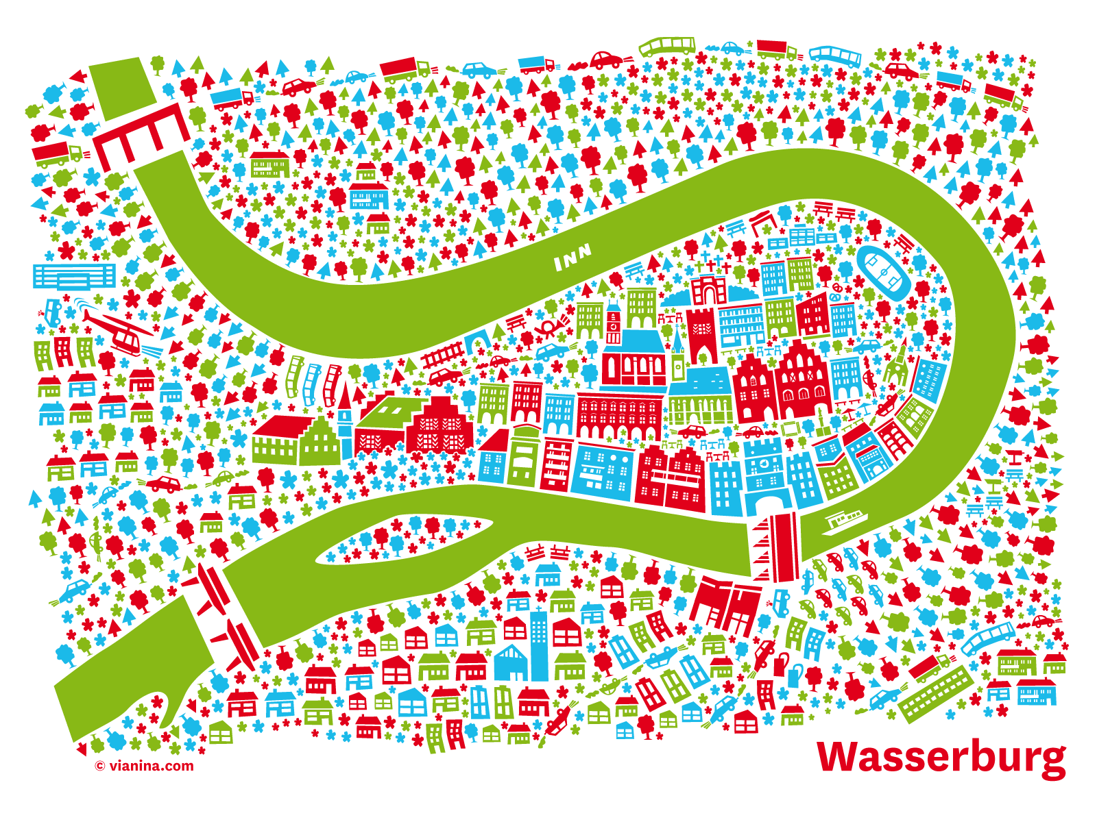 Illustrierter Wasserburg am Inn Stadtplan von der Designerin Nina Wilsmann